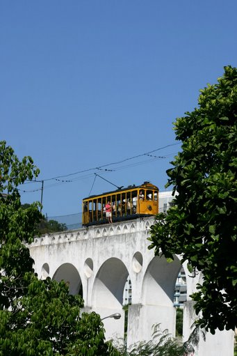 A tramcar on the Santa Teresa Tram in Rio de Janeiro, Brazil, crossing the Arcos da Lapa